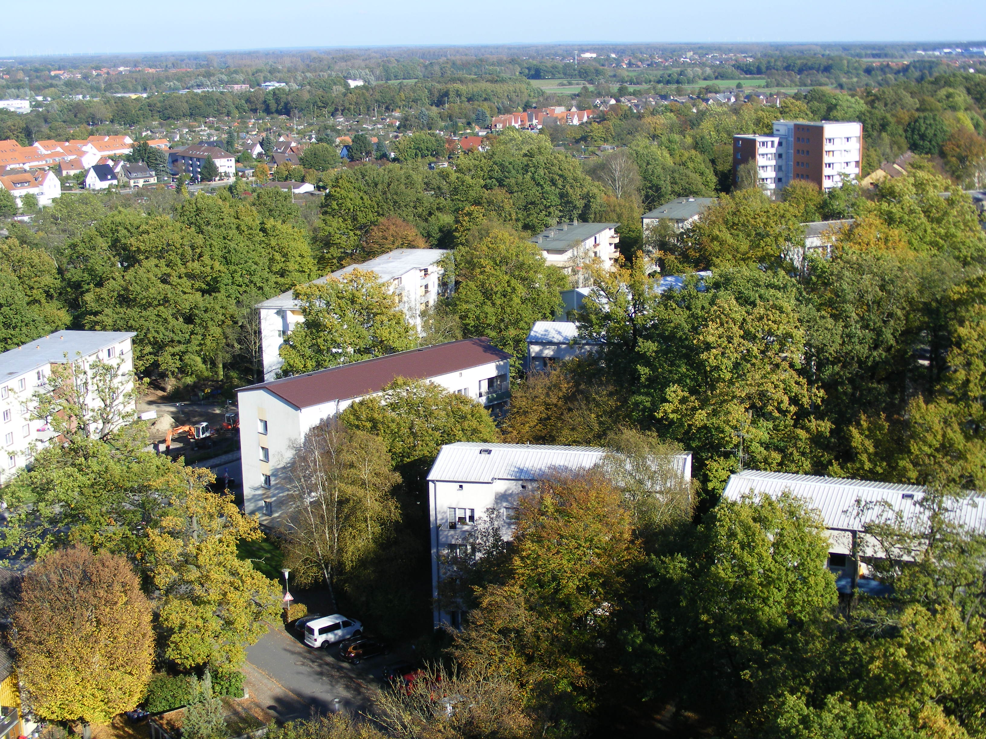 Waldsiedlung Hellwinkel in Wolfsburg